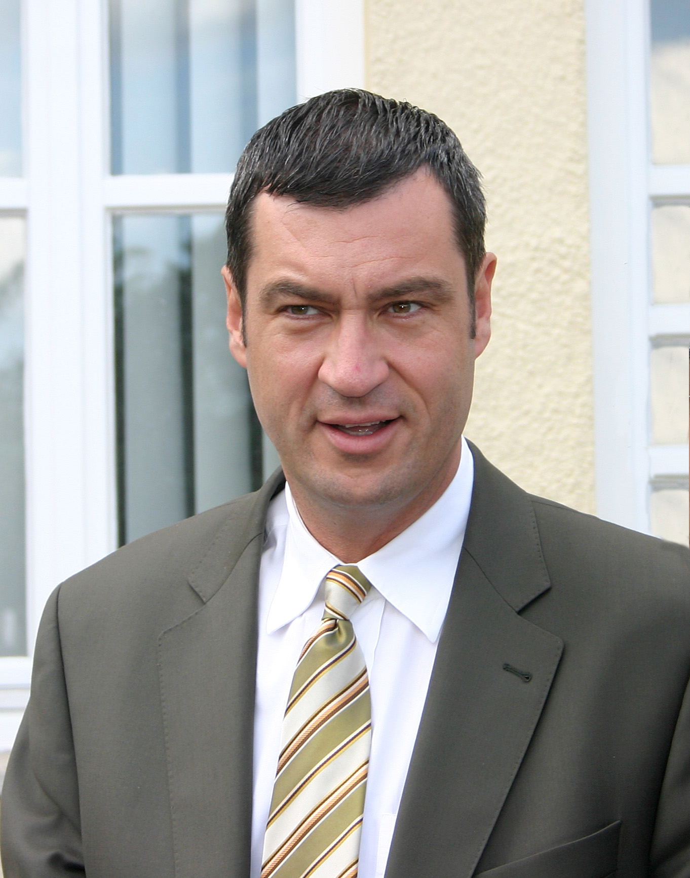 Markus Söder bei einem Festakt in Schrobenhausen